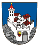 Znak města Mikulov